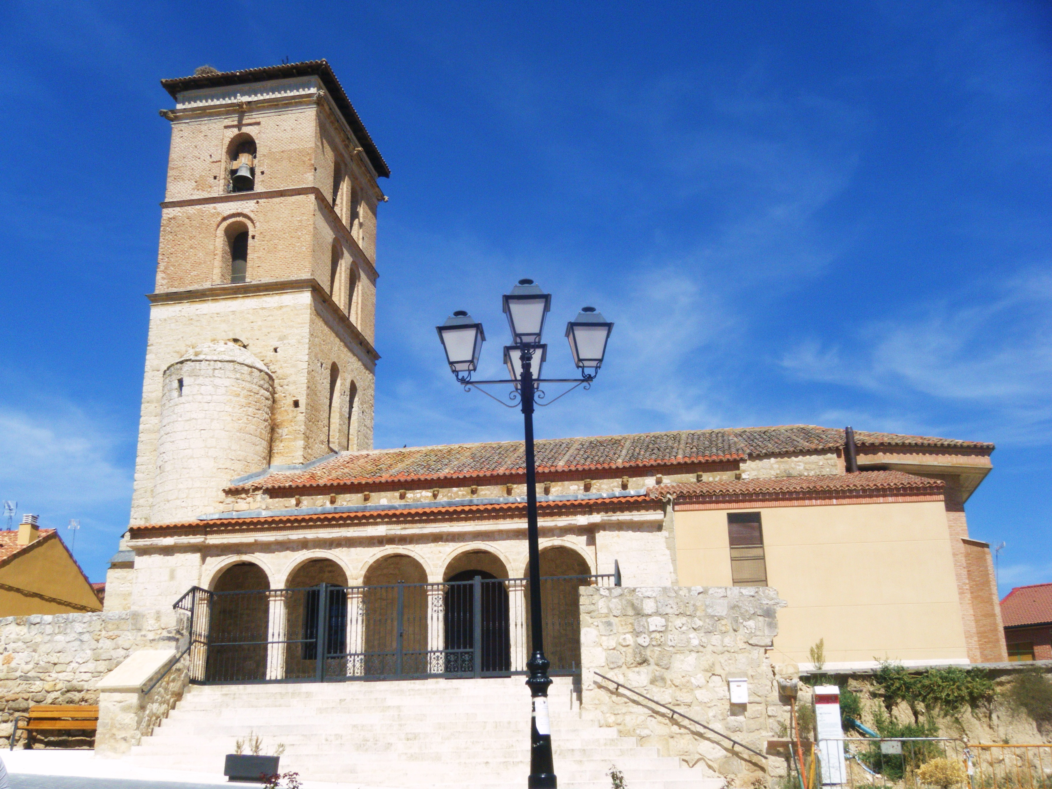 Iglesia de San Cipriano en Fuensaldaña (provincia de Valladolid, Castilla y León).